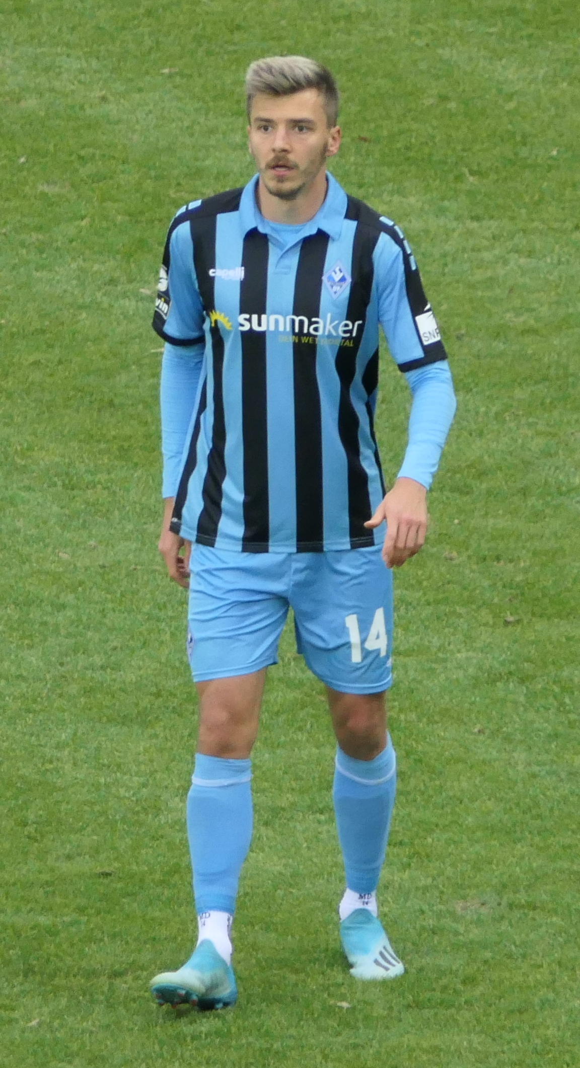 Der Fussballprofi Maurice John Deville im Trikot vom SV Waldhof Mannheim beim Heimspiel gegen Eintracht Braunschweig am 08.12.2019.